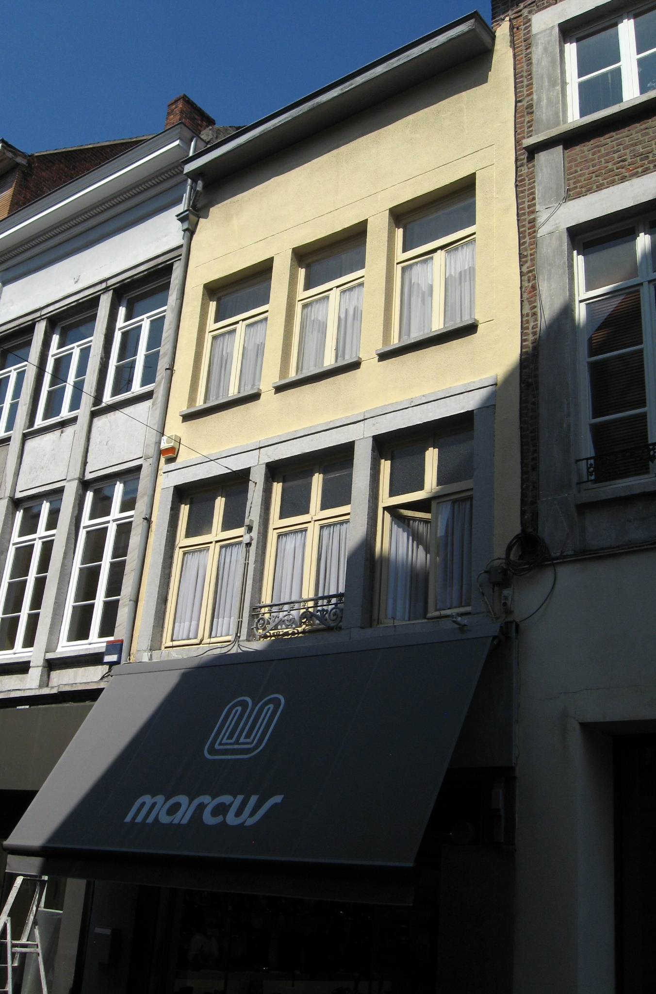 Huis Den Turck later De Forteyne in Hasselt